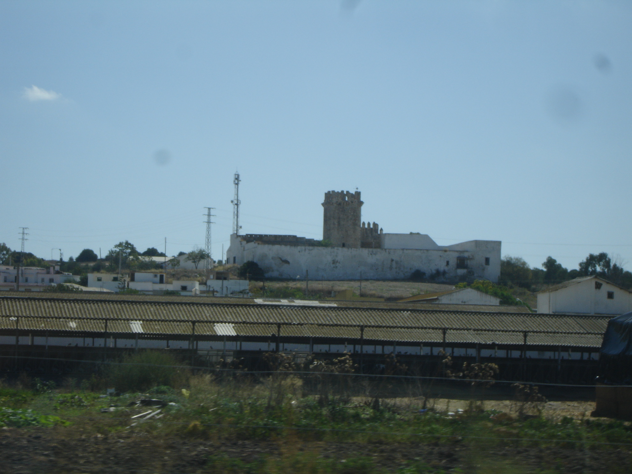 Castillo de Melgarejo, Torremelgarejo (cerca de Jerez de la Frontera)